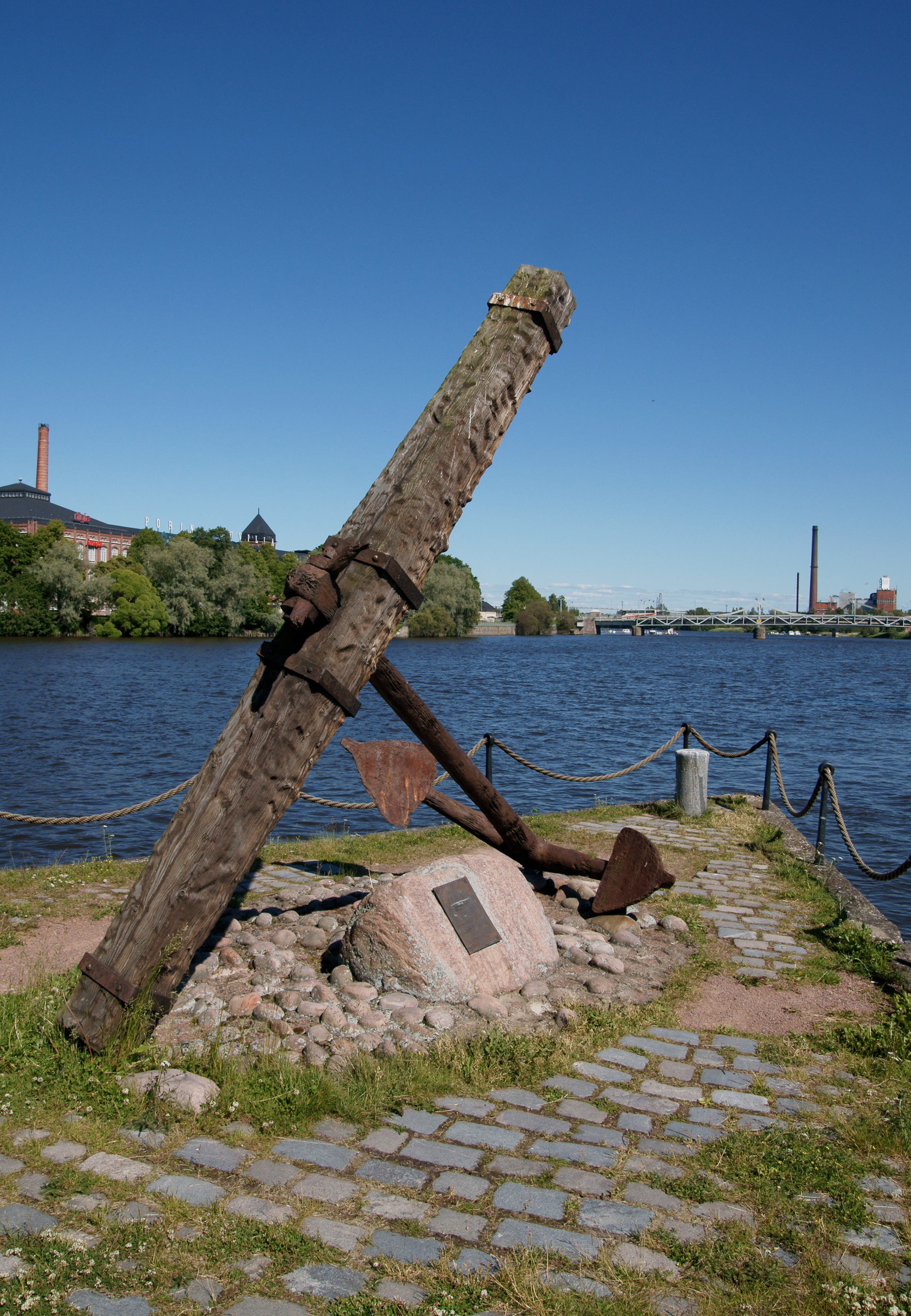 Ankkuri Kirjurinluodon kärjessä, porilaisen merenkulun ja satamien muistoksi.